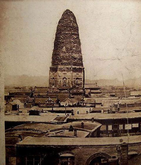 1930年代锦州广济寺塔照片